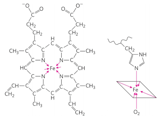 Del lado izquiero está la estructura del greupo heme: la protoporfirina y el atomo de hierro. Del lado derecho está el grupo heme en interacción con la histidina (arriba) y la molécula O2 (abajo.